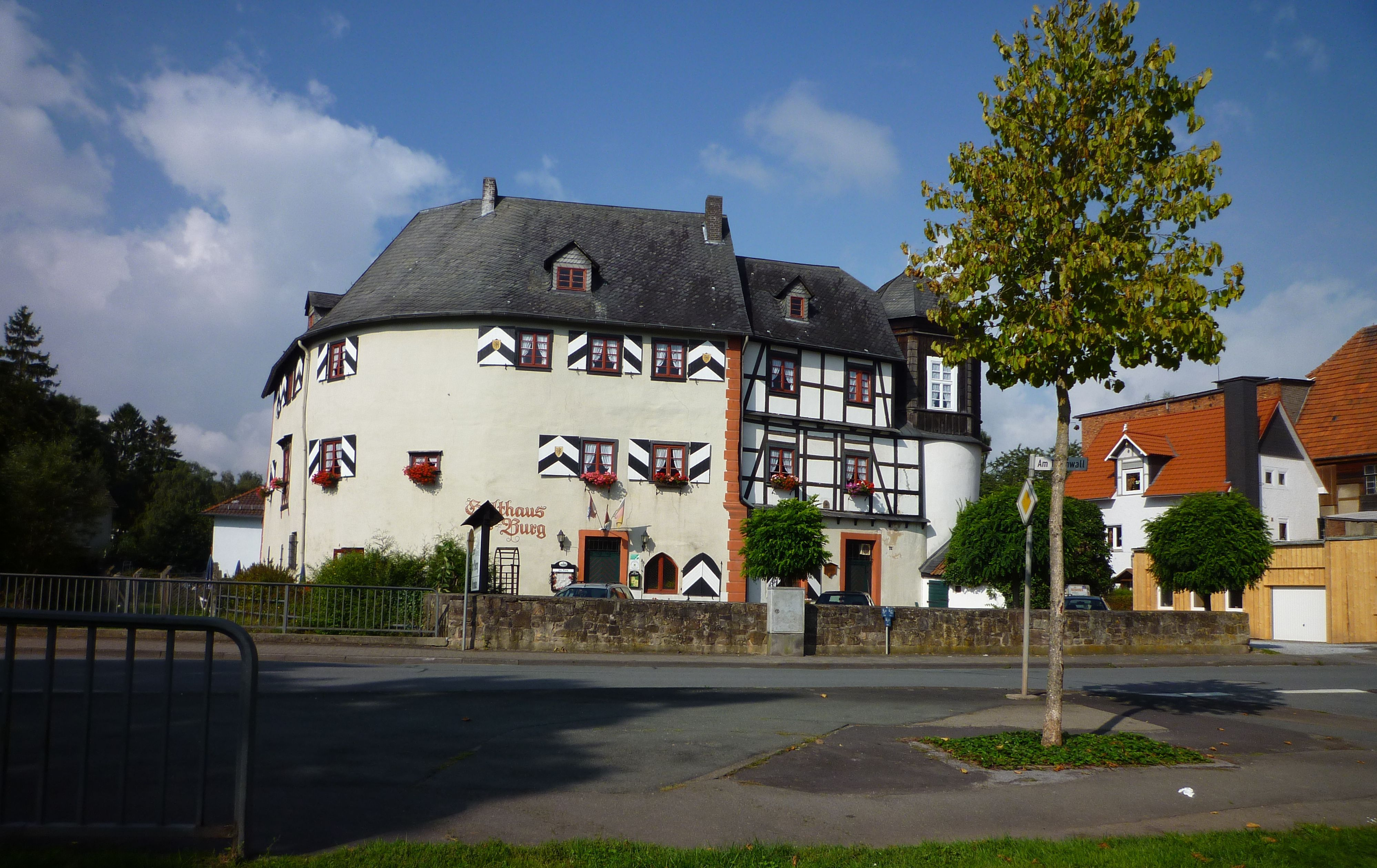 Bad Arolsen - Burghotel Mengerhausen